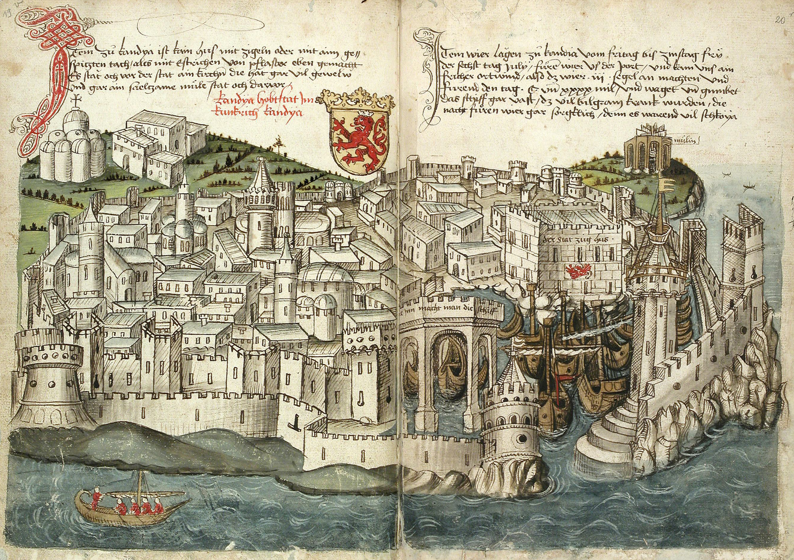 Doppelseite, aus Conrad Grünenberg: Beschreibung der Reise von Konstanz nach Jerusalem. Bodenseegebiet, um 1487. Badische Landesbibliothek Karlsruhe, Cod. St. Peter, pap. 32.